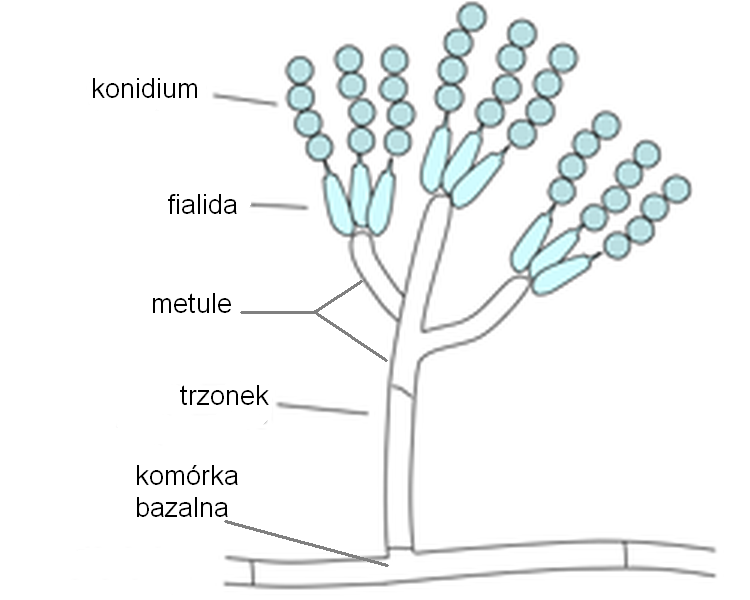 Penicillum (schemat)